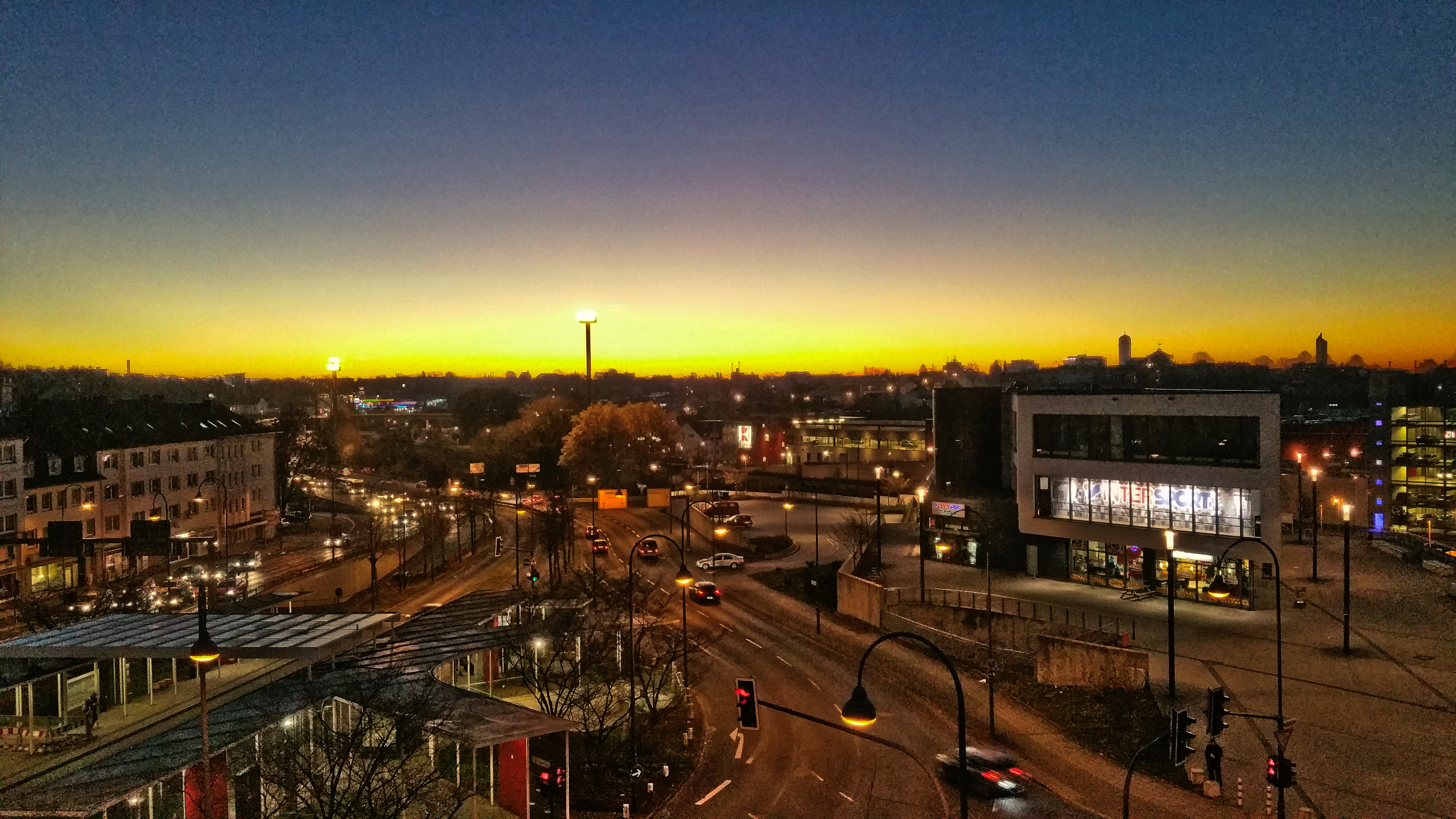 Morgendämmerung über Remscheid; Blick in östliche Richtung von der Bismarckstraße aus in Richtung Neuenkamper Straße (Bildmitte und links) und Willy-Brandt-Platz (rechts) mit den Ausläufern des Geländes des Remscheider Hauptbahnhofes.